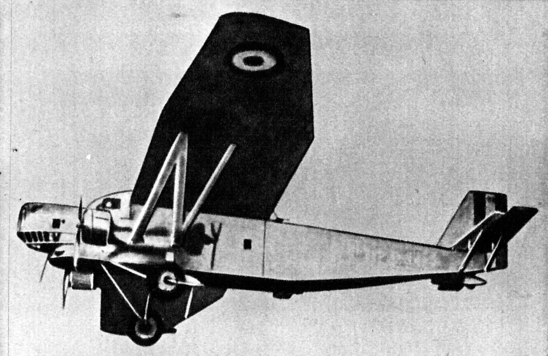 Francuski samolot bombowy Farman F.221.